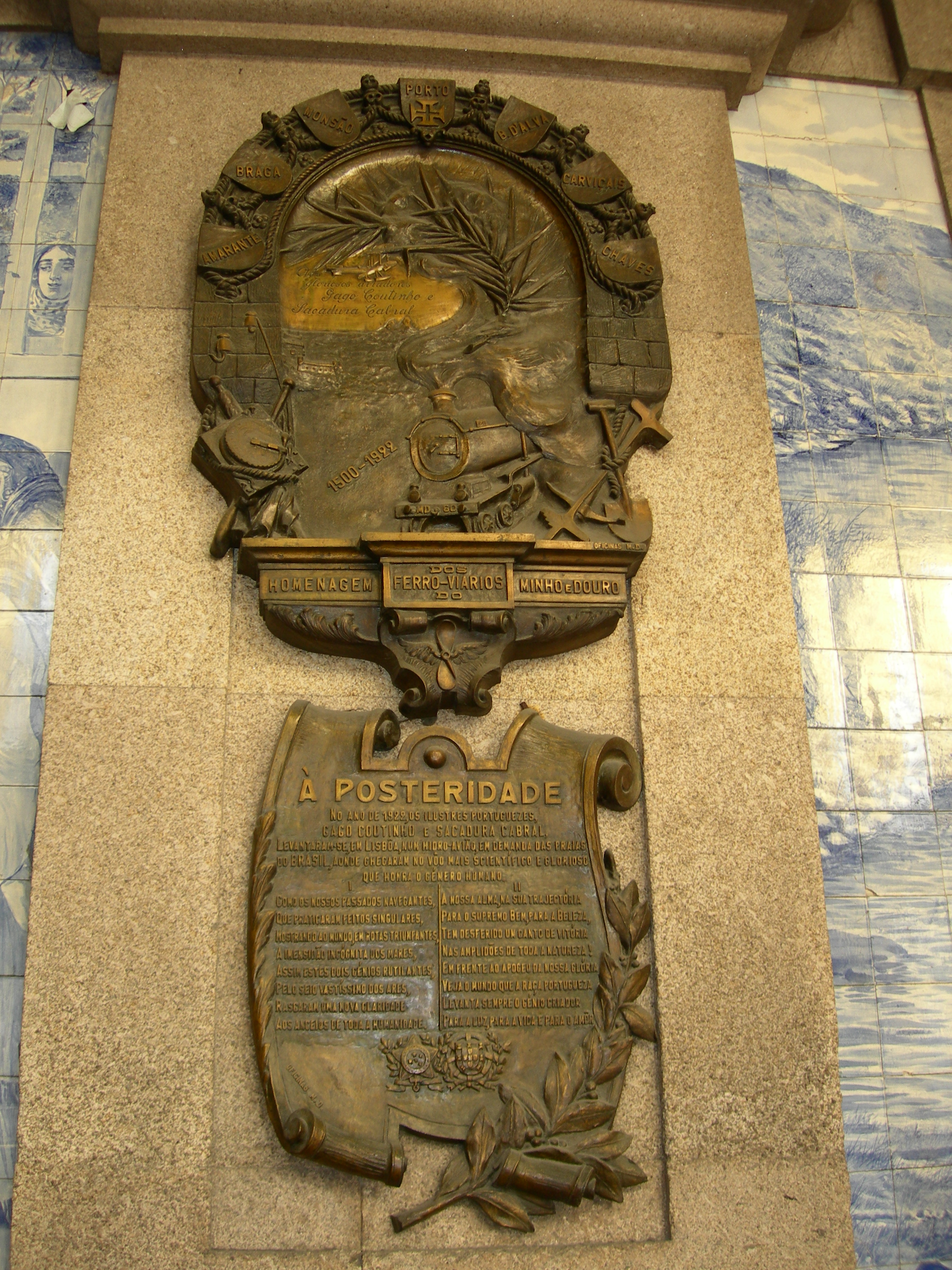 Homenagem dos ferroviarios do Minho e Douro This file was uploaded for Wiki Loves Monuments in Portugal with the unique identifier 72342.